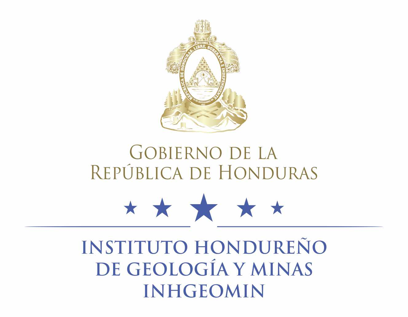 INHGEOMIN